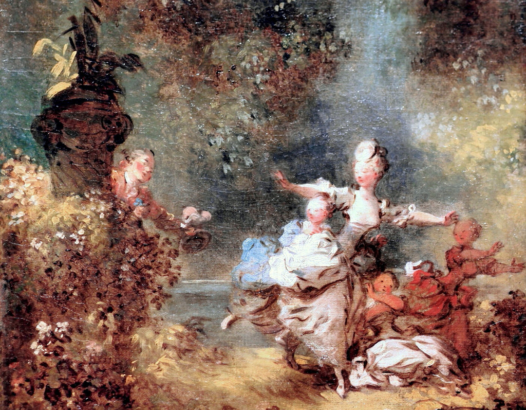 Jean-Honoré Fragonard (1732–1806): La poursuite, 1771. Musée des Beaux Arts d’Angers. Ausschnitt.